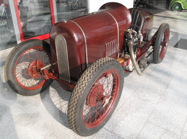 Schasche Cyclecar von 1928 mit Sarolea 500ccm Motorradmotor und Kettenantrieb.Gebaut um den Cyclecarweltrecord (108km/h) 1929 in Wien zu brechen.